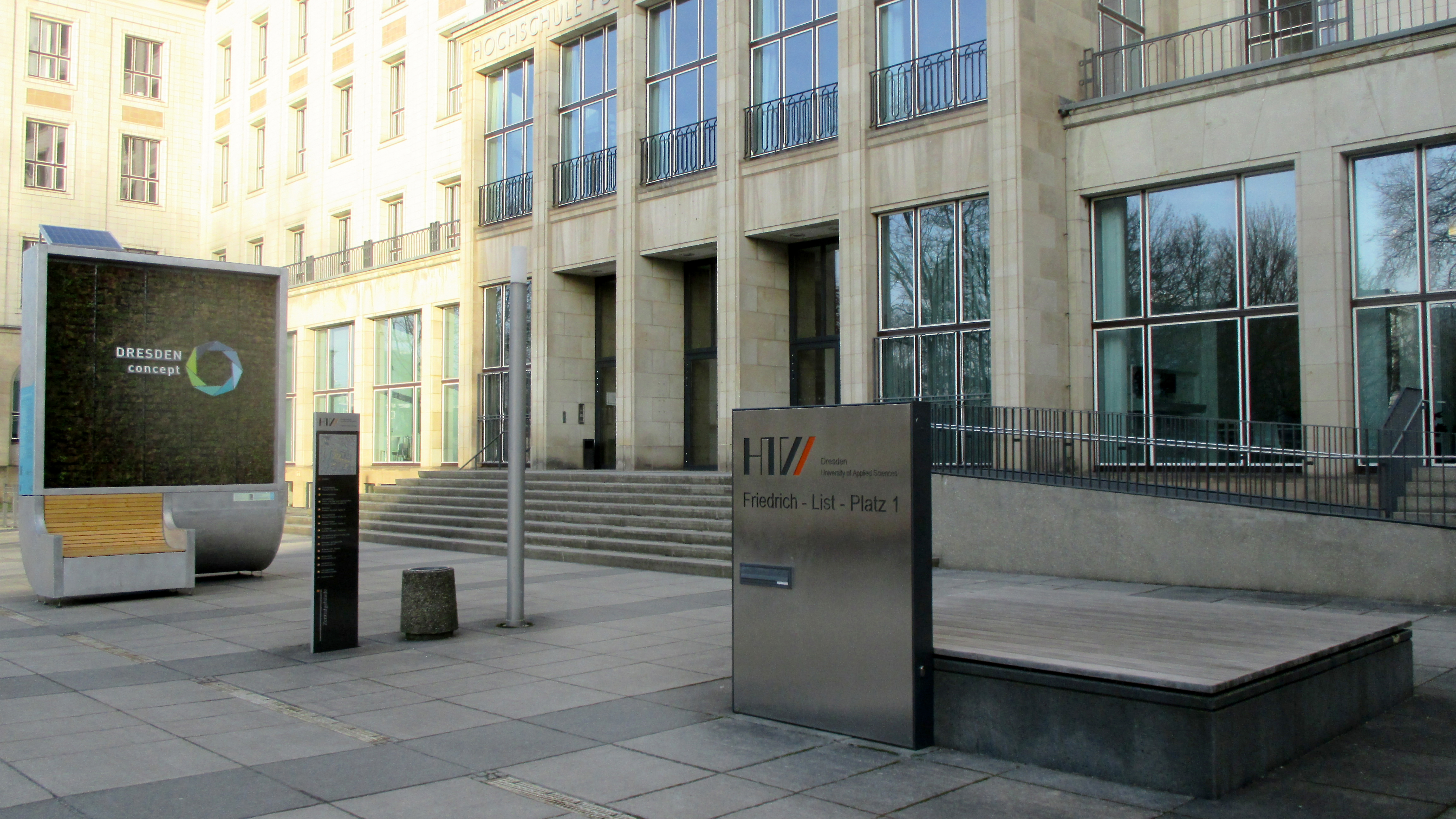 Hochschule für Technik und Wirtschaft (HTW)_Dresden_Friedrich-List-Platz_Dresden_Bild_1